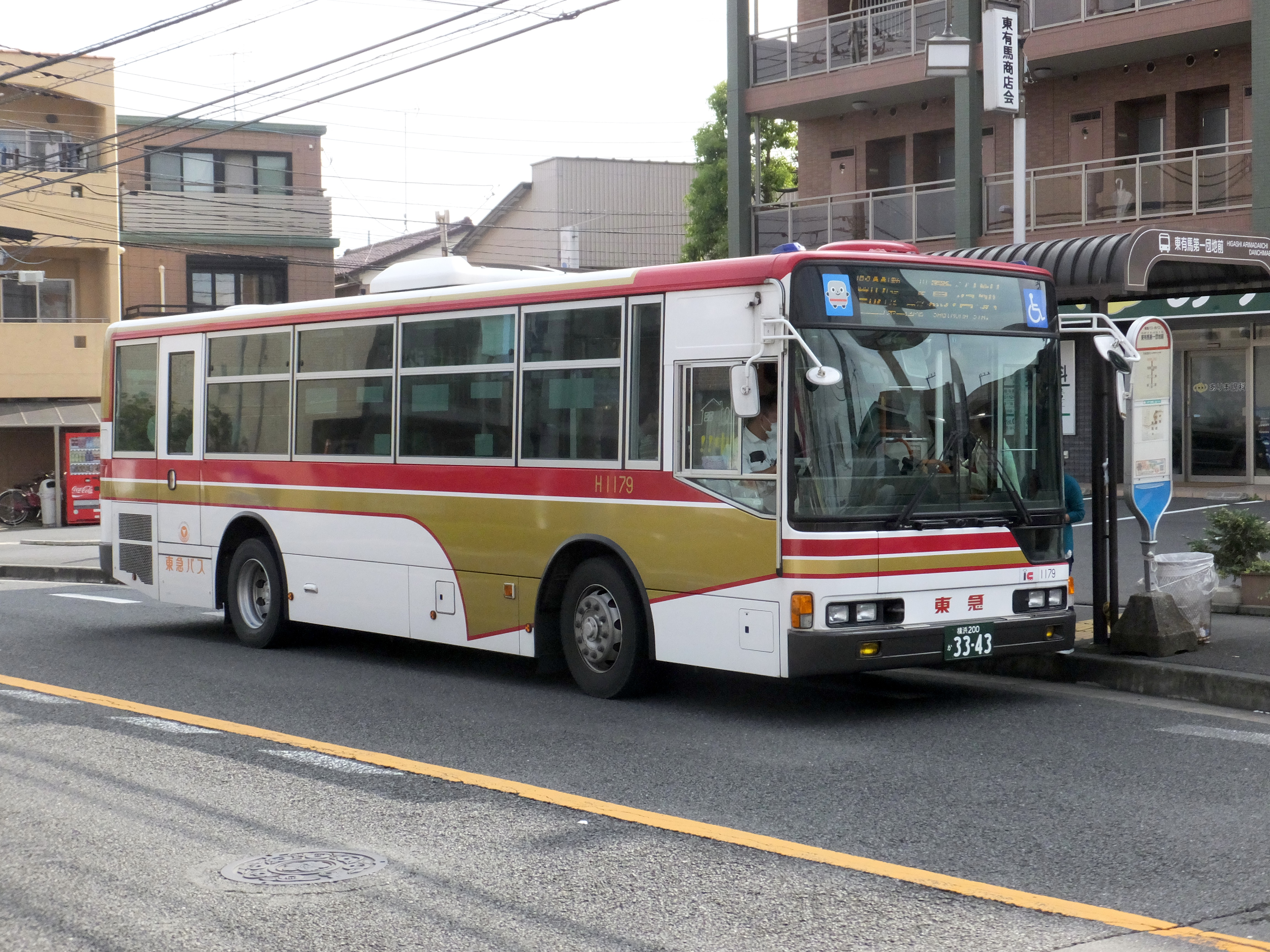 東急バス東山田営業所 H1179号車 東急バス20周年記念先代観光バス塗装車 隠されているが、正面のライトの間には「東急」の飾り文字がある。（川崎市中原区大戸小学校付近にて撮影）